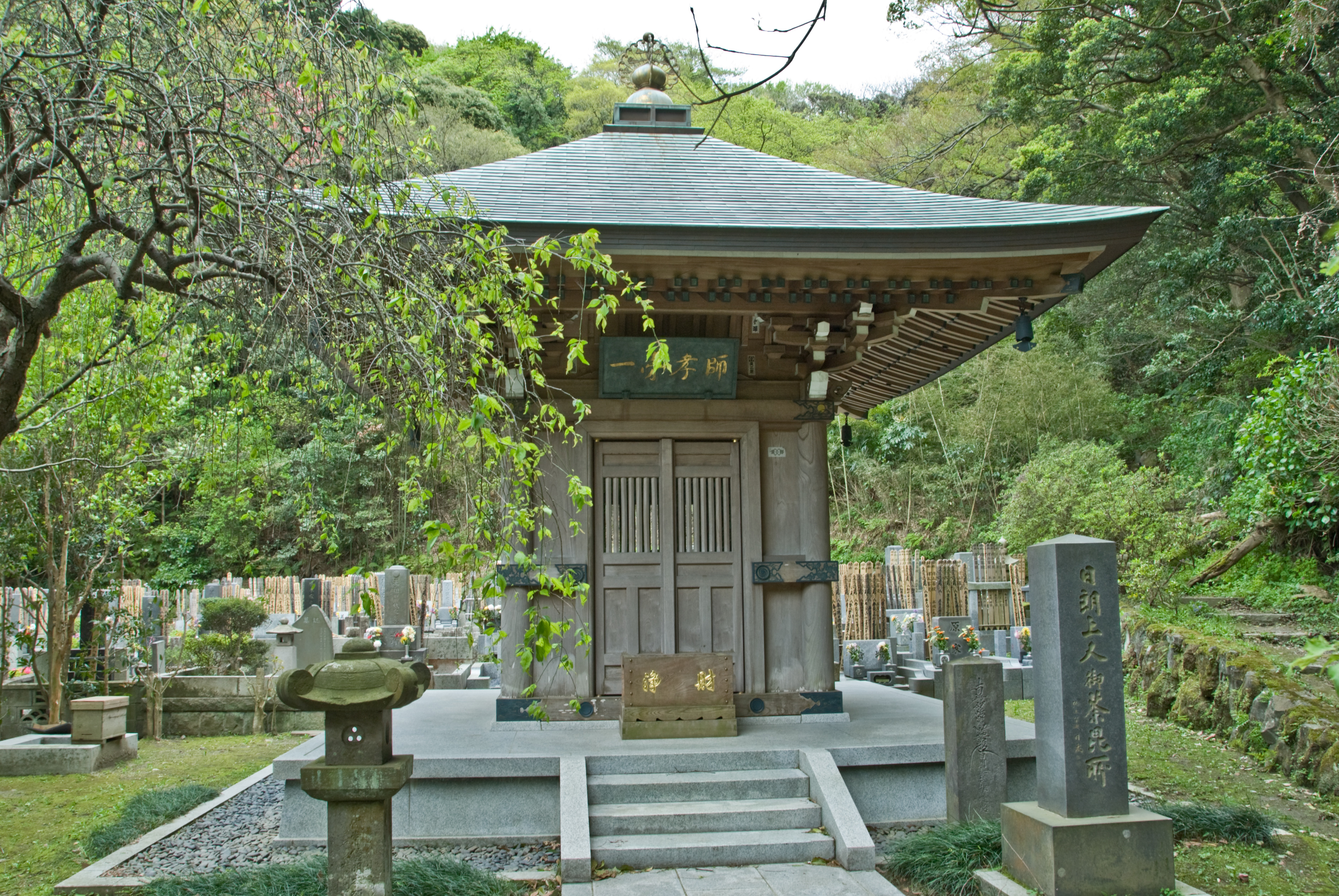 Ankokuron-ji, Kamakura. Nichiro's pavilion